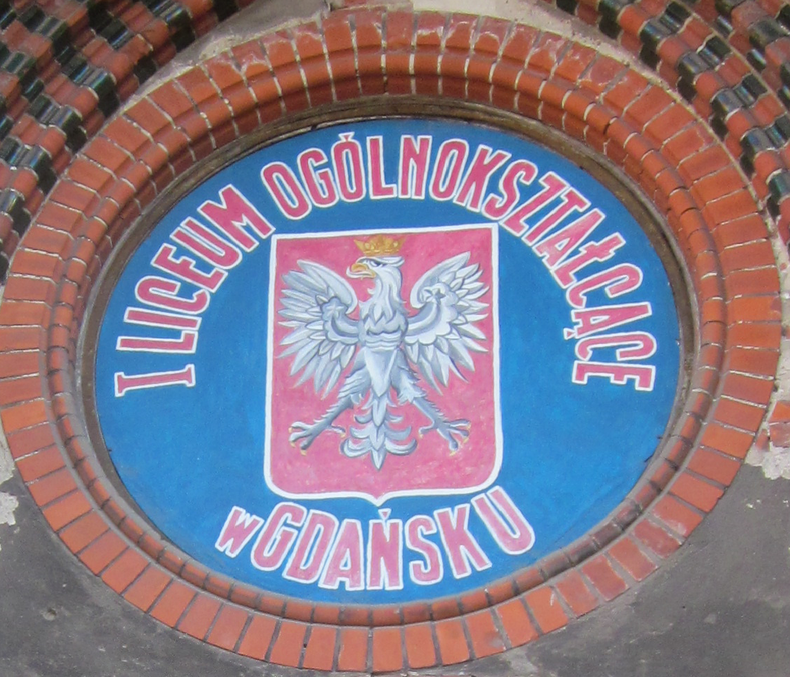 Logo des Nikolaus-Kopernikus-Lyzeums in Danzig.